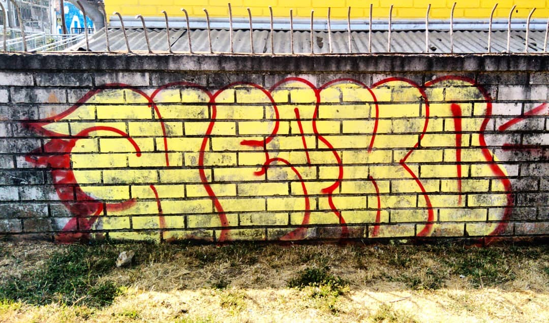 Graffiti sencillo en una pared de ladrillos, color amarillo, delineado en rojo